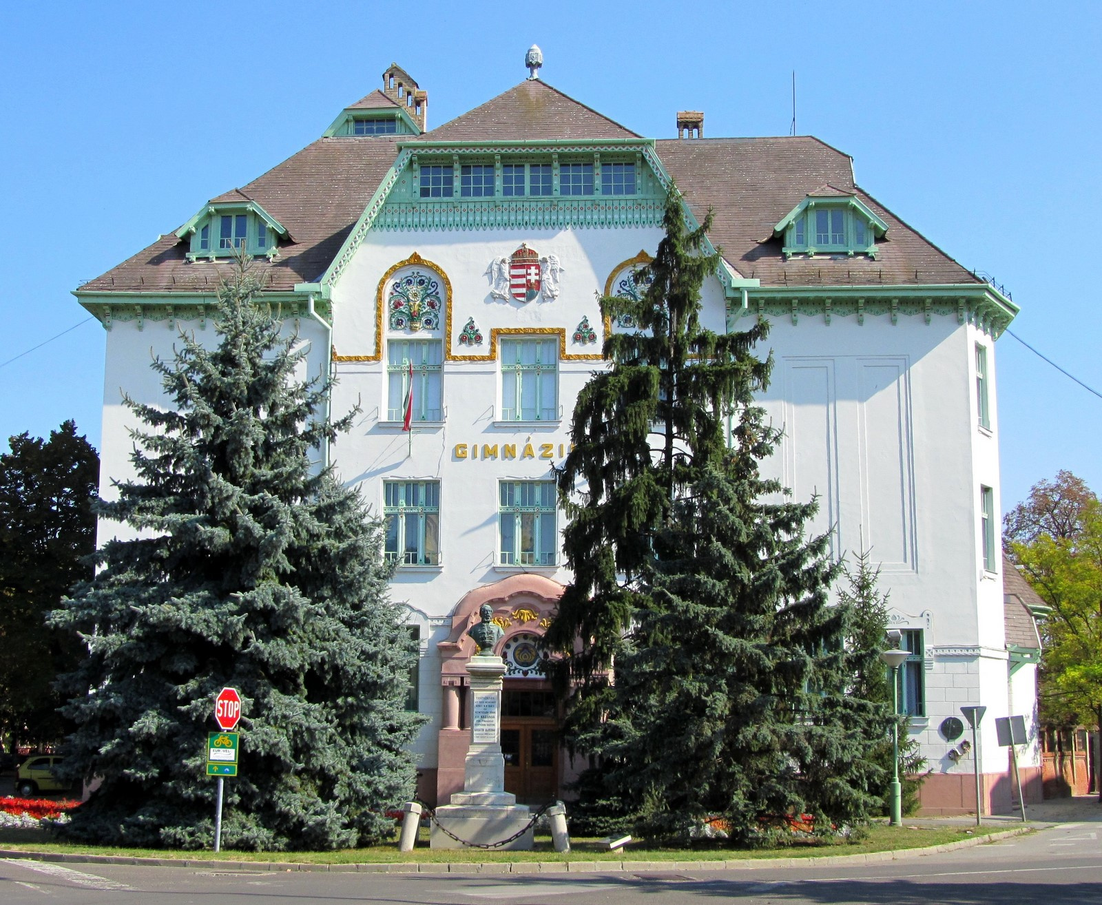 Batsányi János Gimnázium és Szakközépiskola (Csongrád, Kossuth Lajos tér 1.) This is a photo of a monument in Hungary. Identifier: 12543